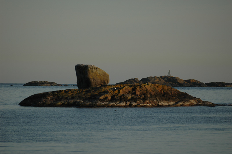 Humlesekken.